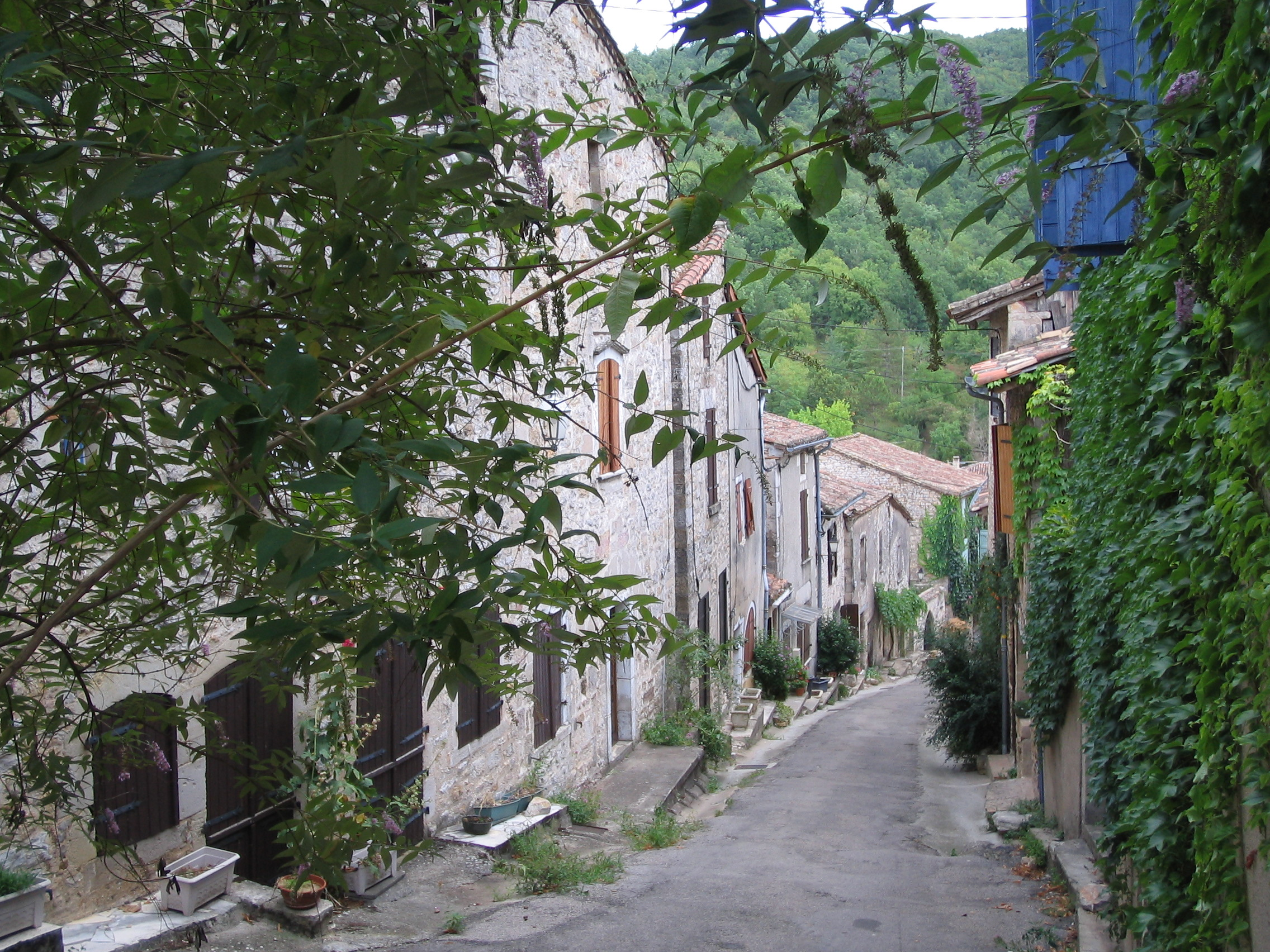 Tronçon de la rue principale de Bruniquel (France, Tarn-et-Garonne) prise en plongée.